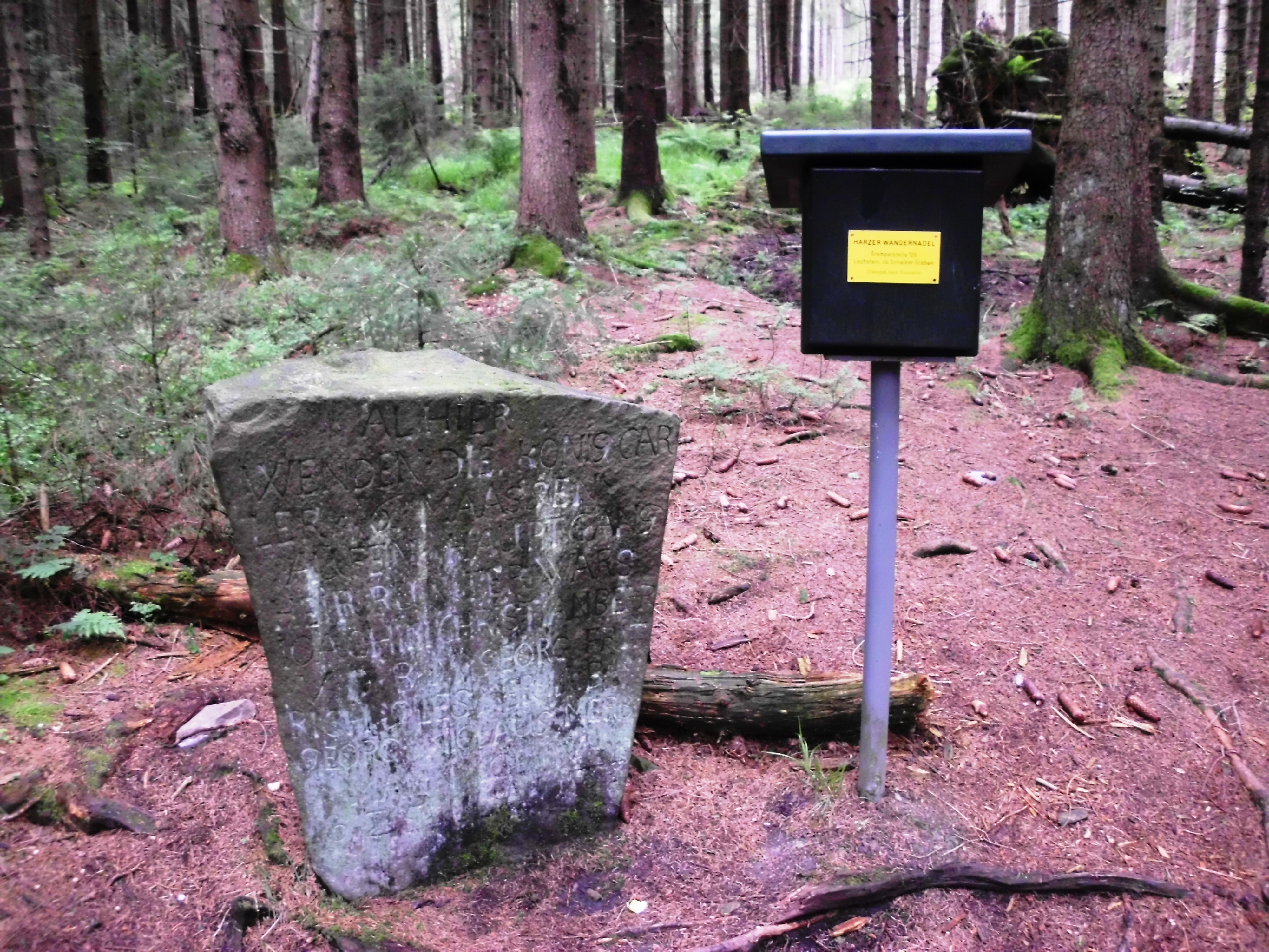 Lochstein am Oberen Schalker Graben bei Schulenberg-Festenburg